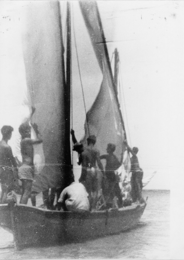 אימוני הים של הפלמ"ח בקיסריה 8 - פלוגה ה - בקורס ימי קצר בקיסריה - שדות ים - מכבי צעיר גרעין ד